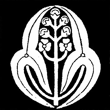 抱き沢瀉